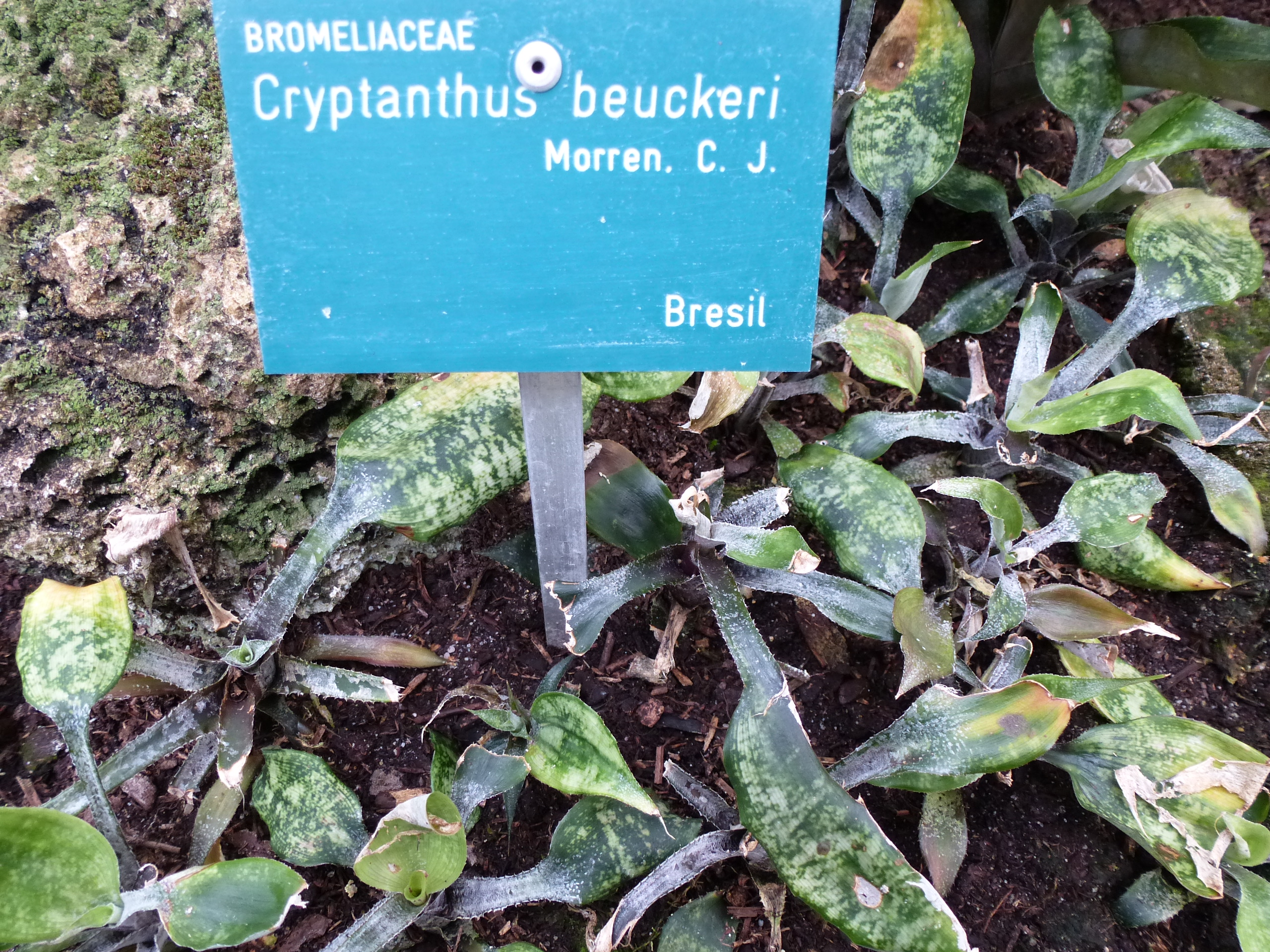 Cryptanthus beuckeri - Serres d'Auteuil - Jardin botanique de la Ville de Paris - France